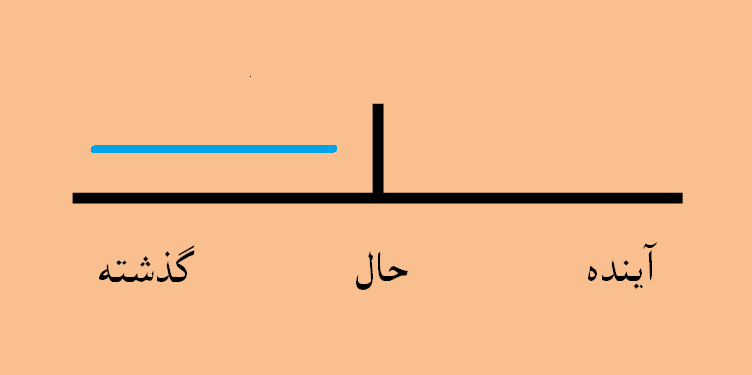 USED TO DIAGRAM